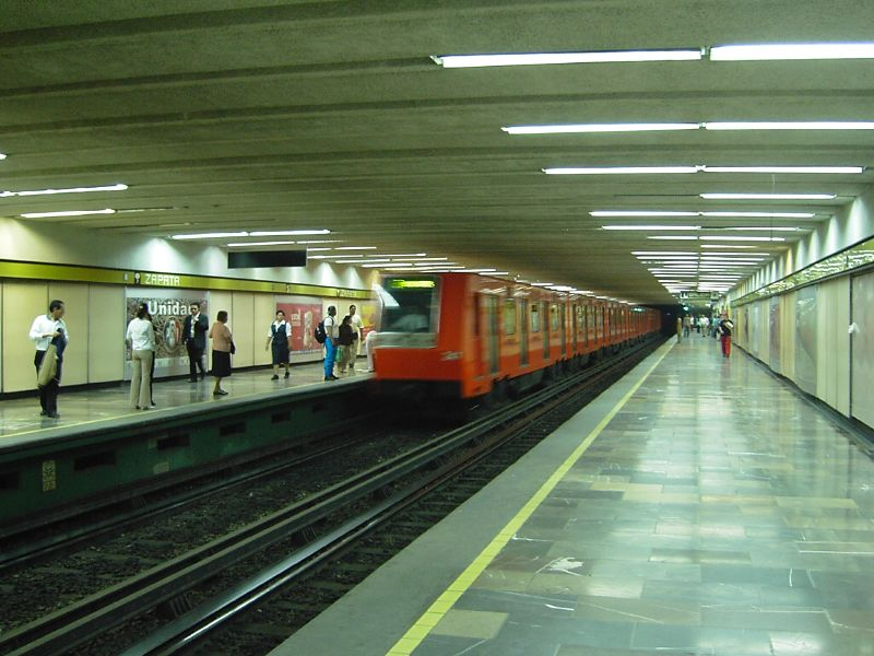 imagen de la estacion